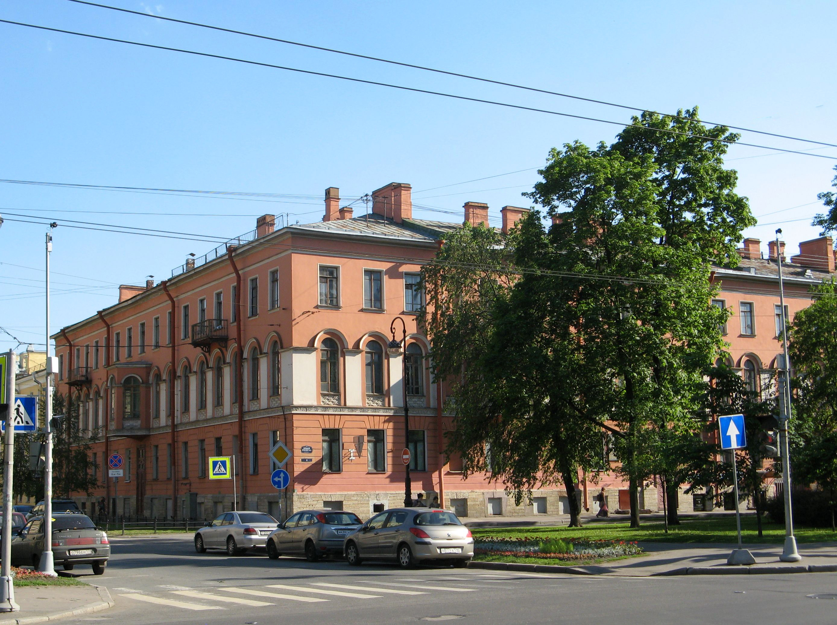 Дом Юнкера А. Ф. (Санкт-Петербург и Лен.область, Санкт-Петербург, Большой проспект В. О., 8, 3-я линия В. О., 4)